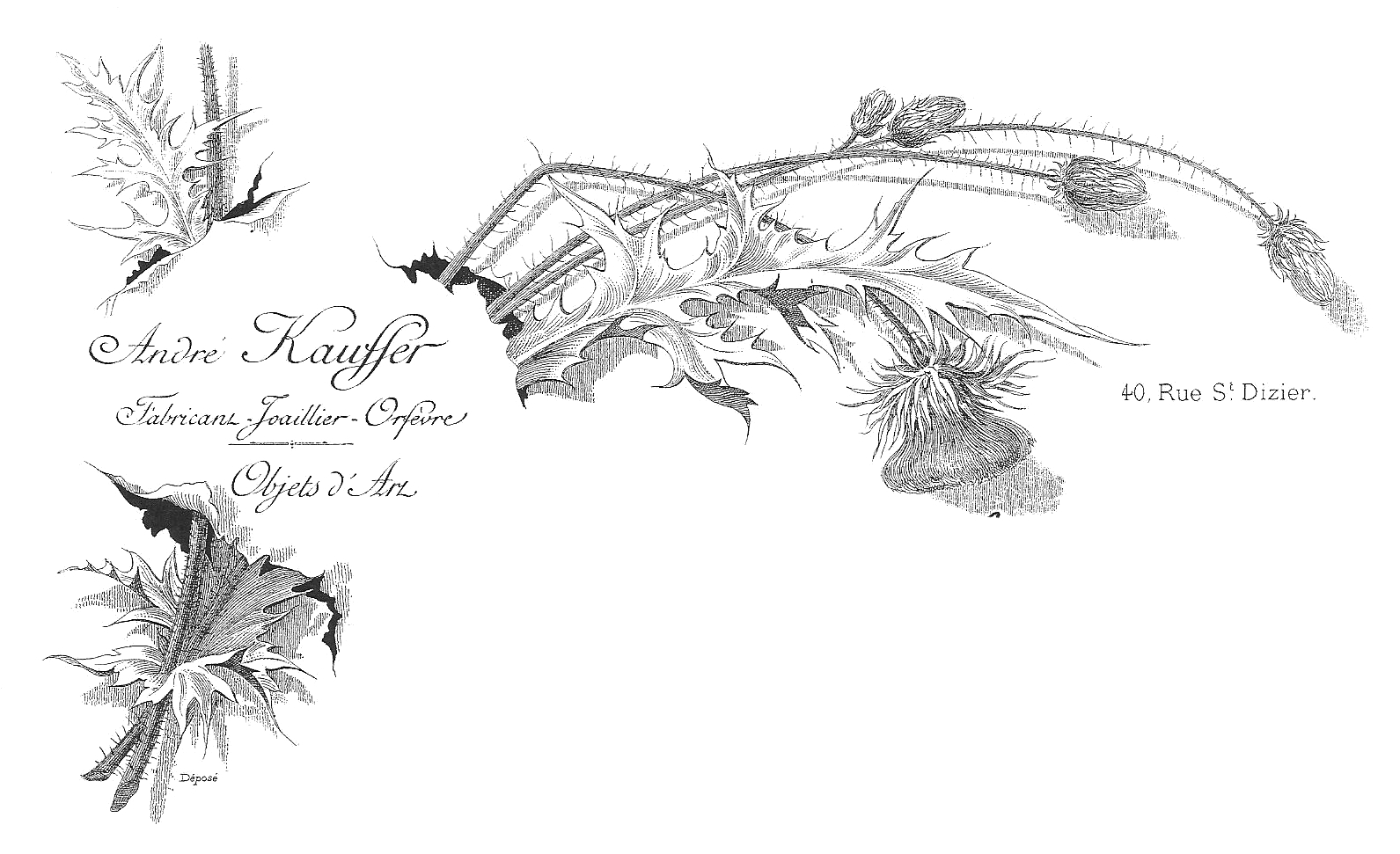 Papier à en-tête de la maison André Kauffer, orfèvre-joaillier à Nancy